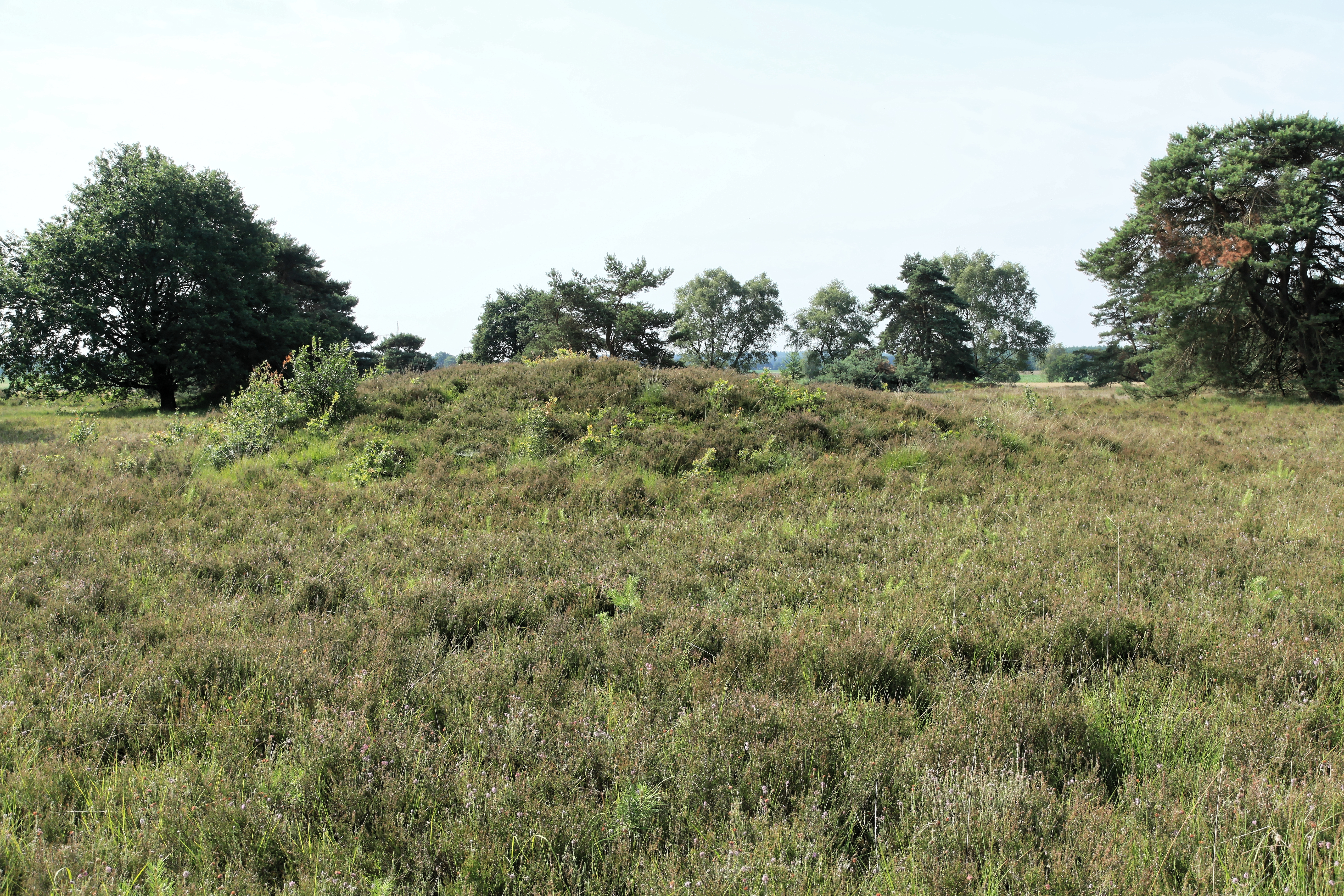 Männige Berge, Alter Loruper Weg in Spahnharrenstätte